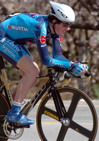 Afbeelding van Isidro Nozal.